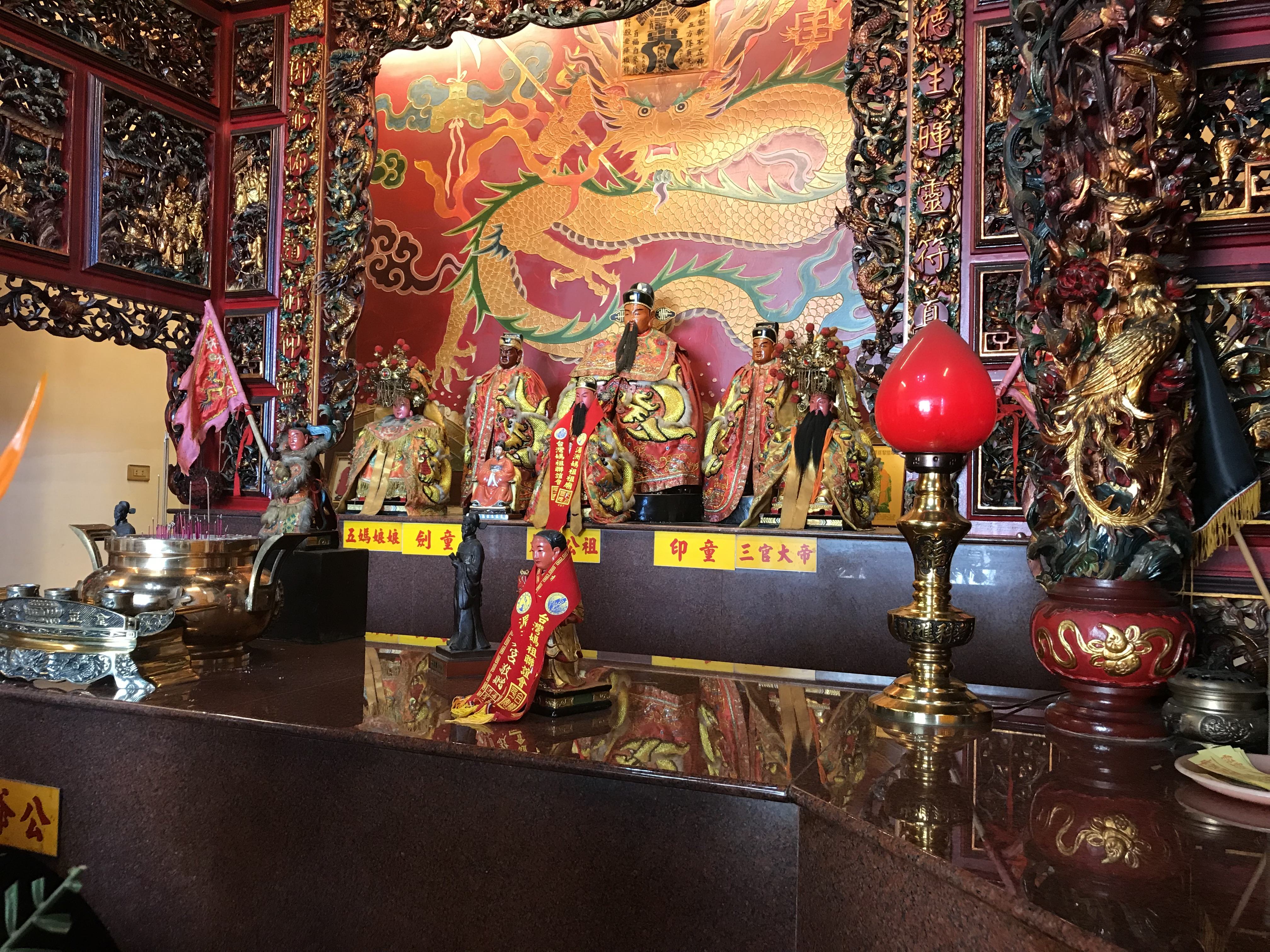 中文（台灣）: 大里永隆宮神像